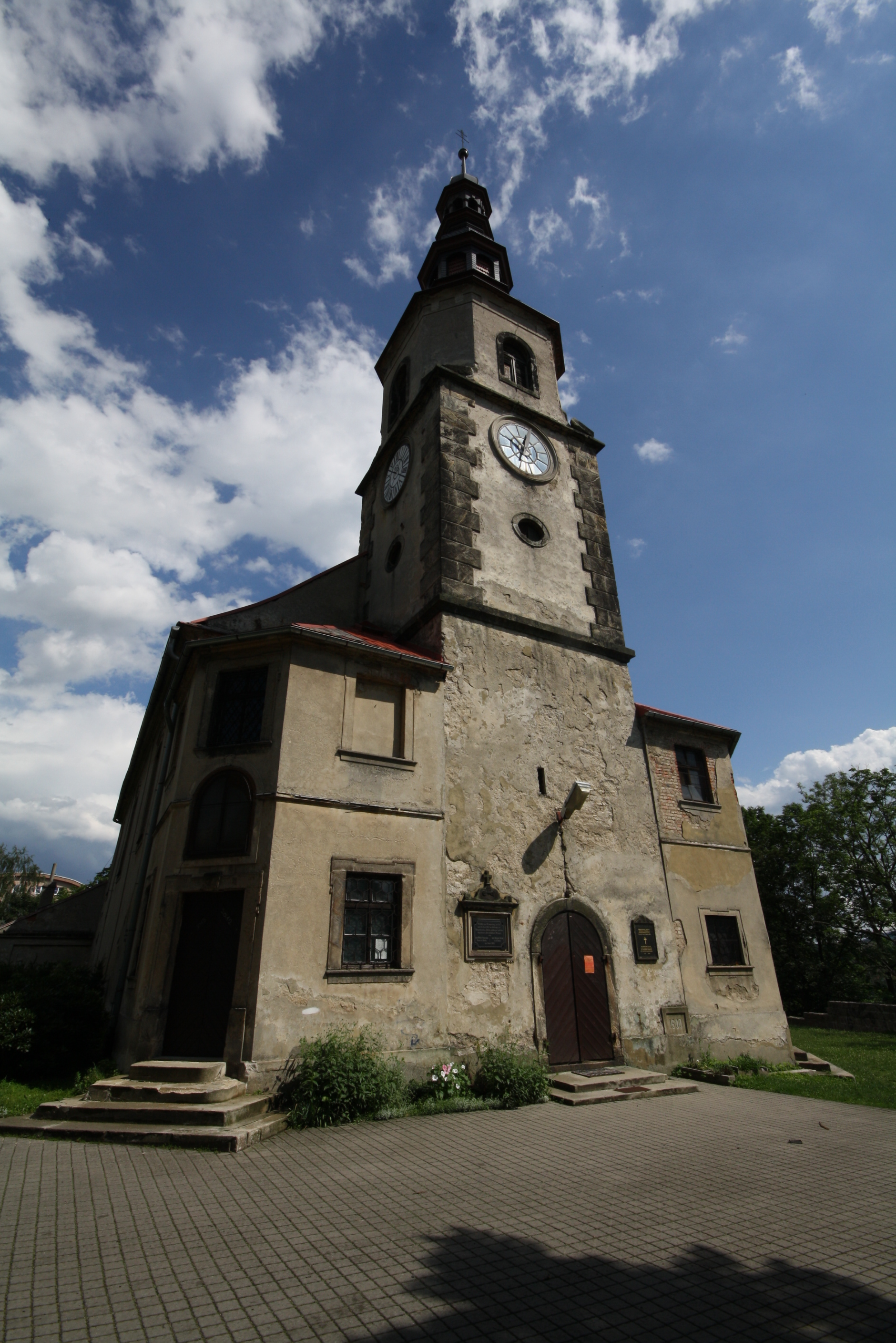 Kostel svatého Jana Křtitele, Na Žižkově, Rochlice, Liberec.